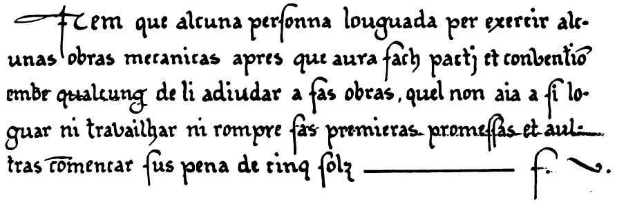 Deliberation du Conseil de Toulon 1394 édité en 1863